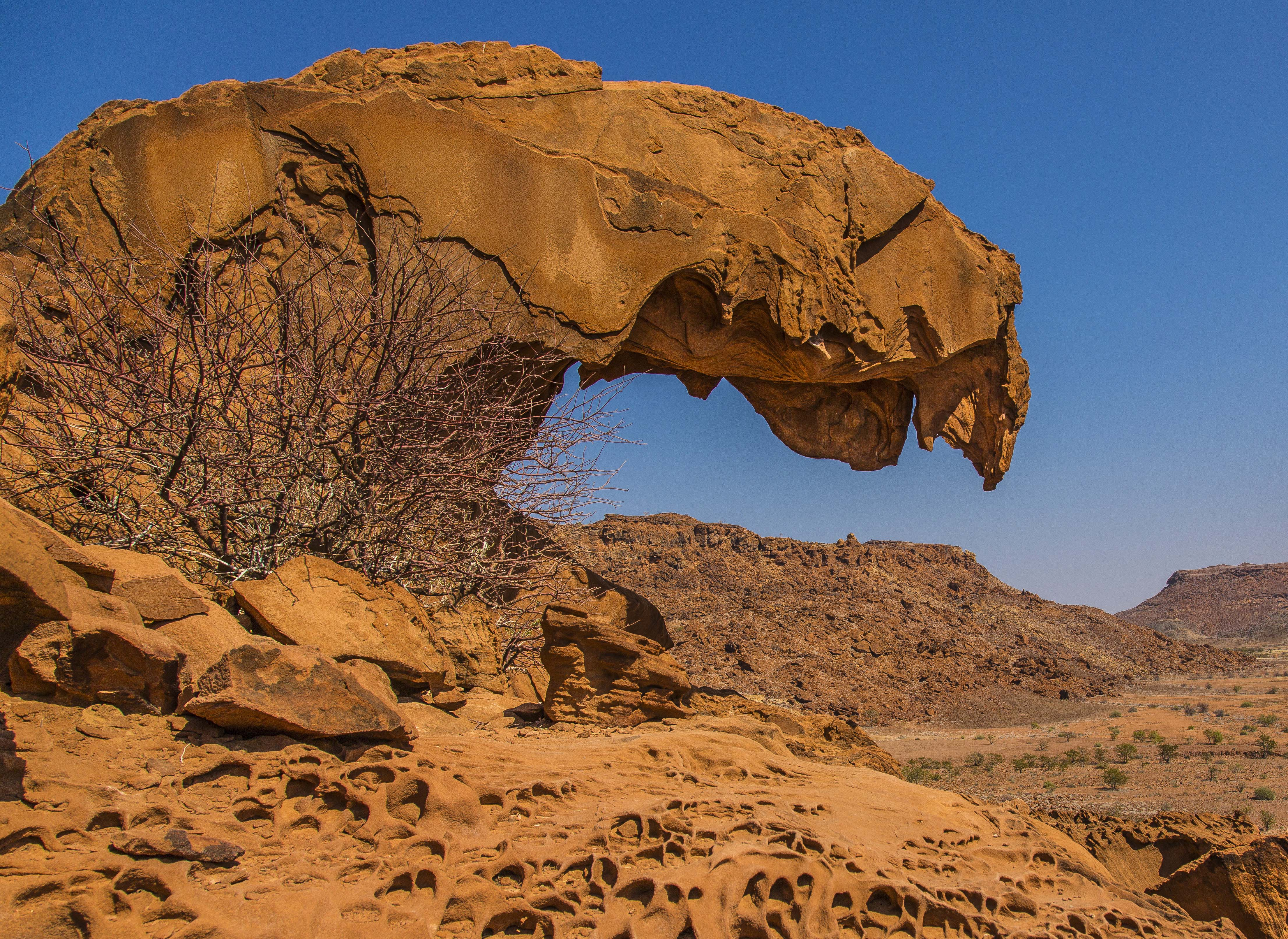 Felsformation „Löwenmaul“ in Twyfelfontain, Namibia